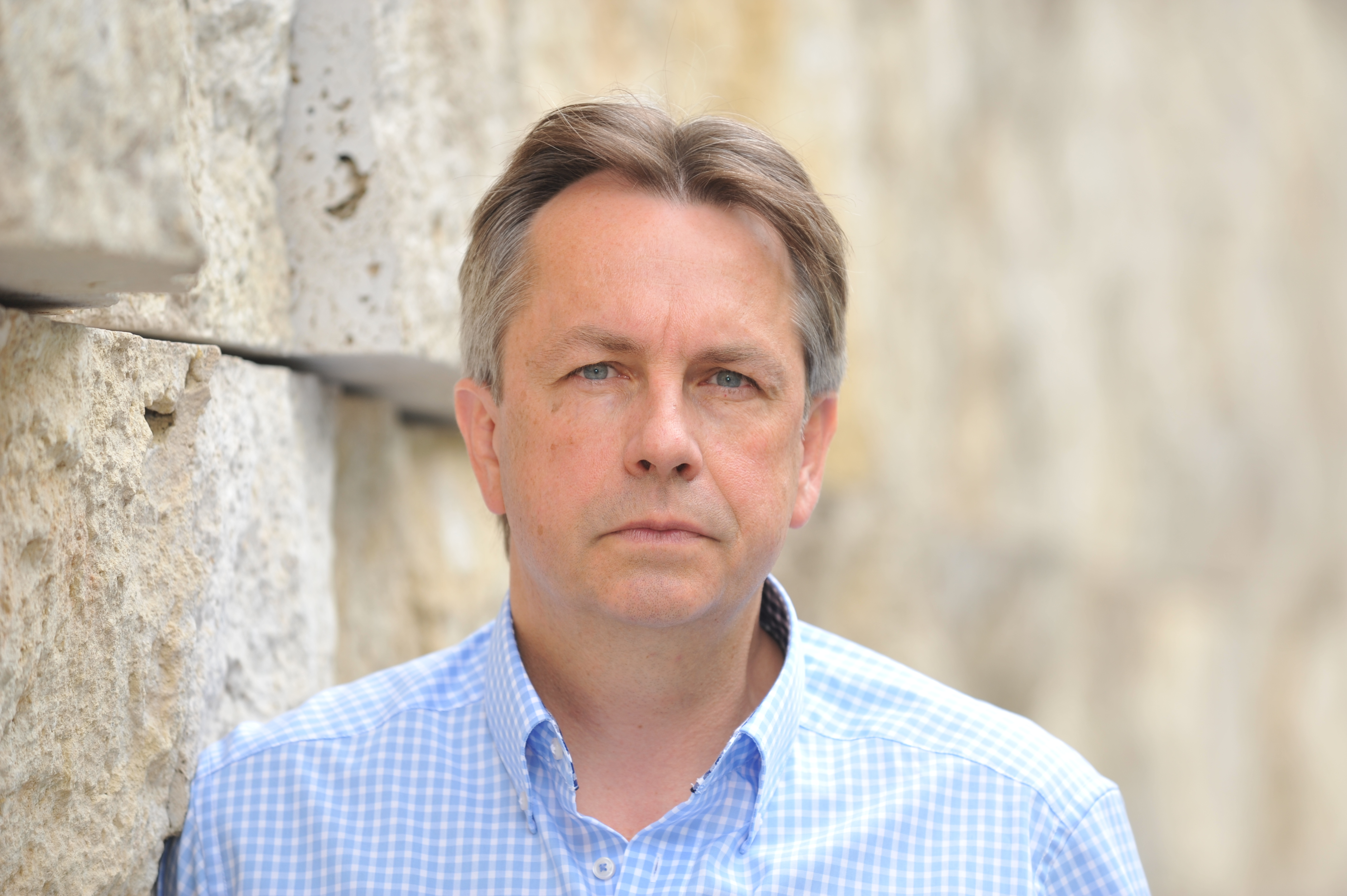 Thomas Kraft .Autor Foto:catherina Hess